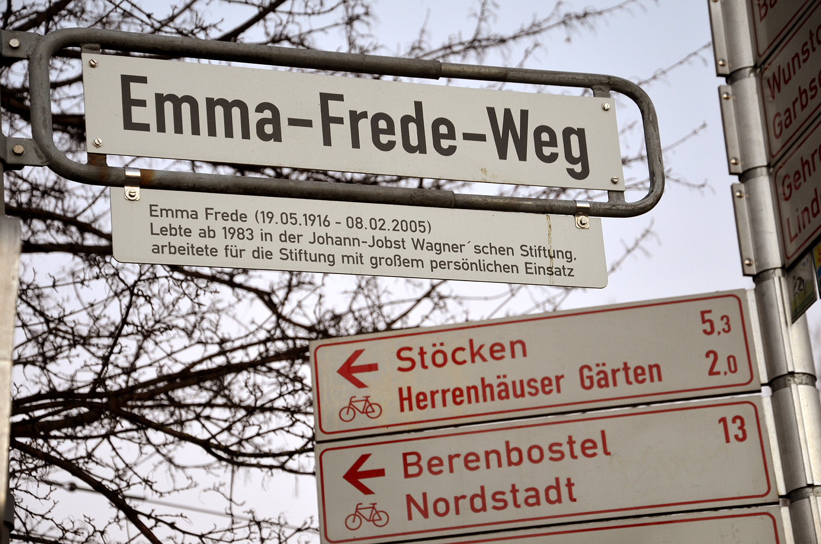 Der laut Beschluss des Stadtbezirksrats Mitte vom 13. März 2002 benannte Emma-Frede-Weg längs der Ihme in der Calenberger Neustadt, hier zu sehen neben Hinweisschildern für Radfahrer am Ende der Justus-Garten-Brücke. Die zusätzliche angebrachte Legendentafel erläutert: „Emma Frede (19.05.1916 - 08.02.2005) / Lebte ab 1983 in der Johann-Jobst Wagener’schen Stiftung, arbeitete für die Stiftung mit großem persönlichen Einsatz“ ...